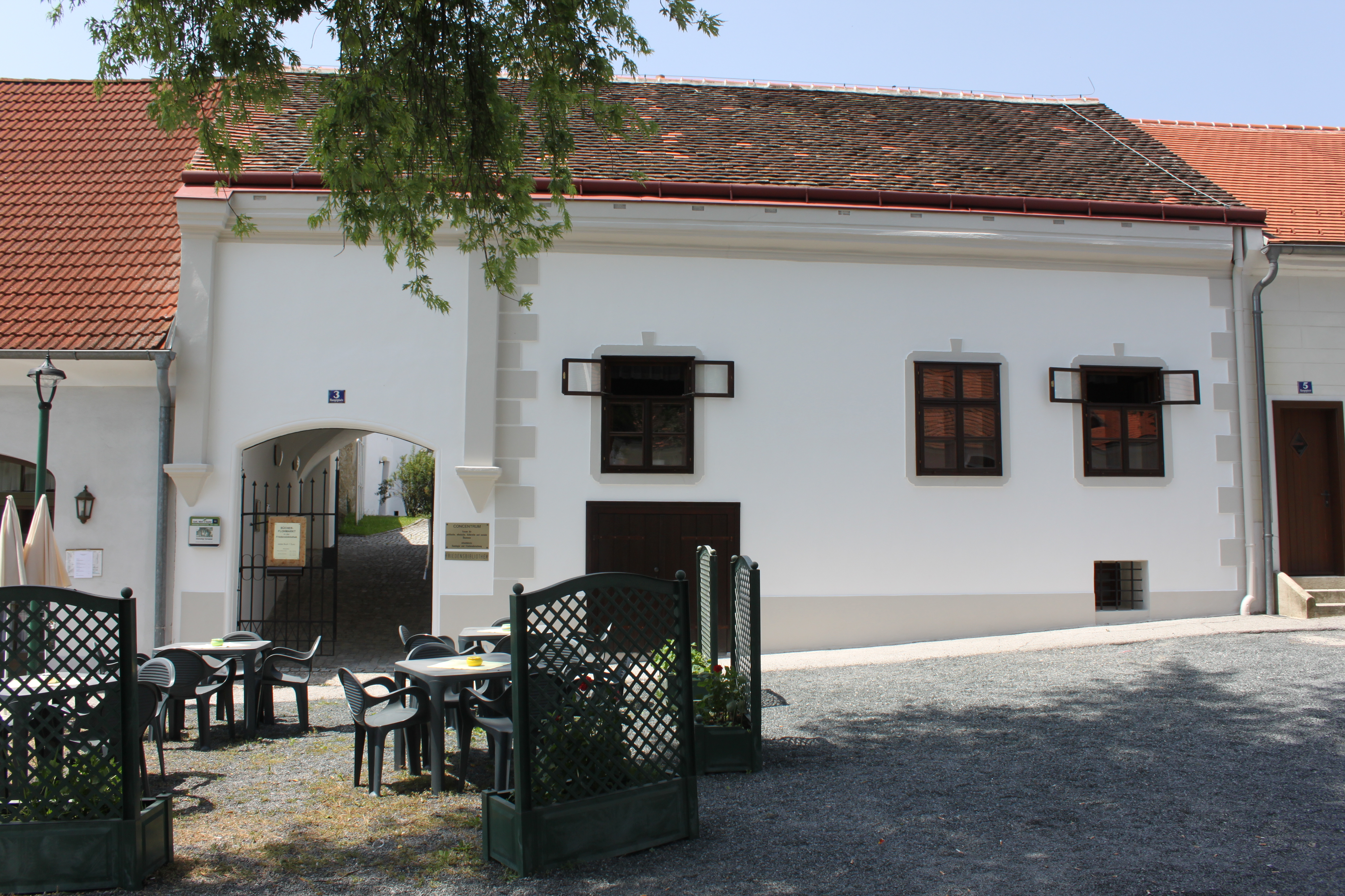 Rabbinatshaus